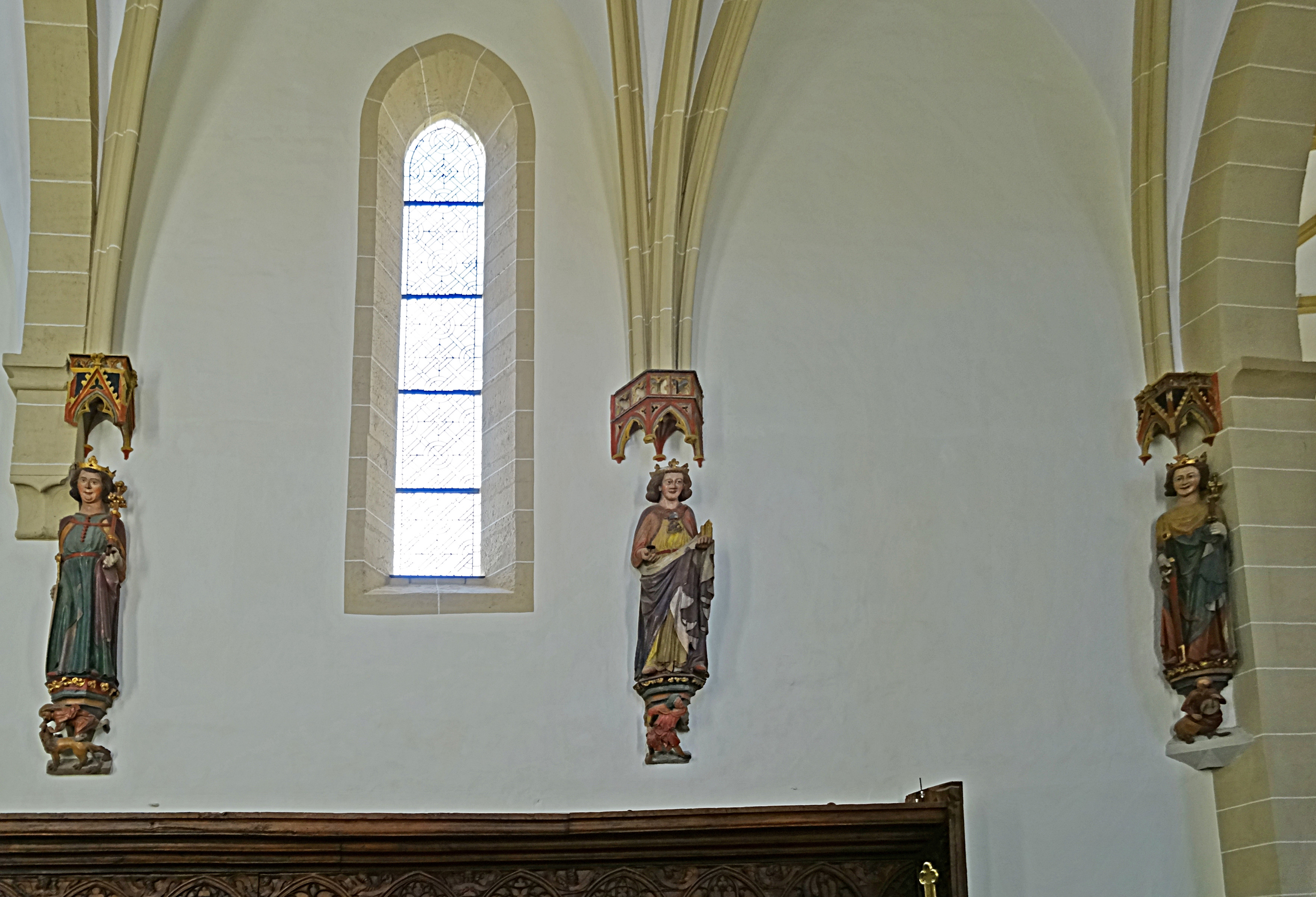 monumentale Stifterfiguren über dem südlichen Chorgestühl im Dom zum Heiligen Kreuz Nordhausen